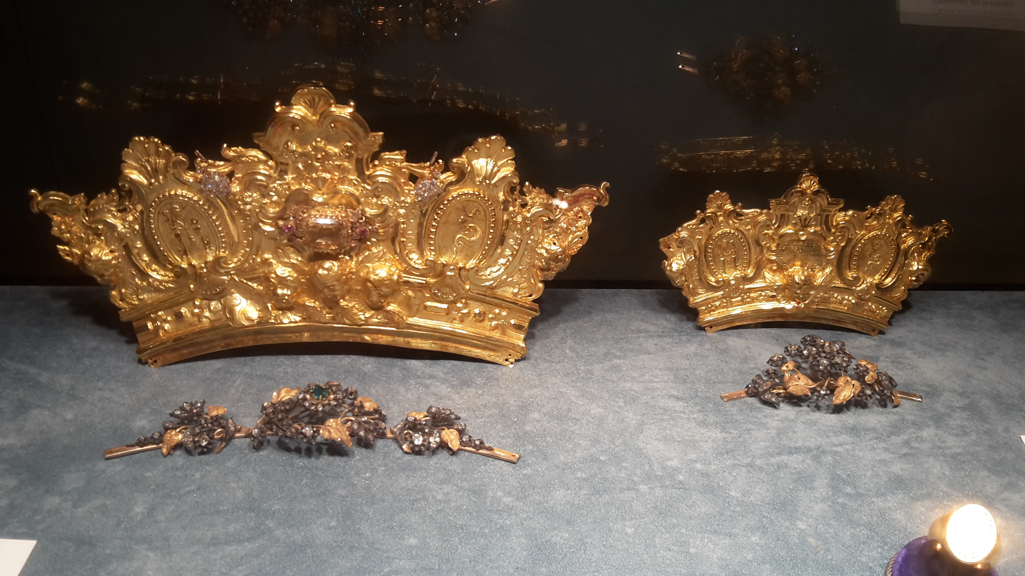 Le corone in oro donate dal Rev. Capitolo Vaticano alla Vergine della Madia, Bartolomeo Baroni, Napoli 1769. Affiancate da due diademi del XIX sec. che venivano posti alla base della corone.